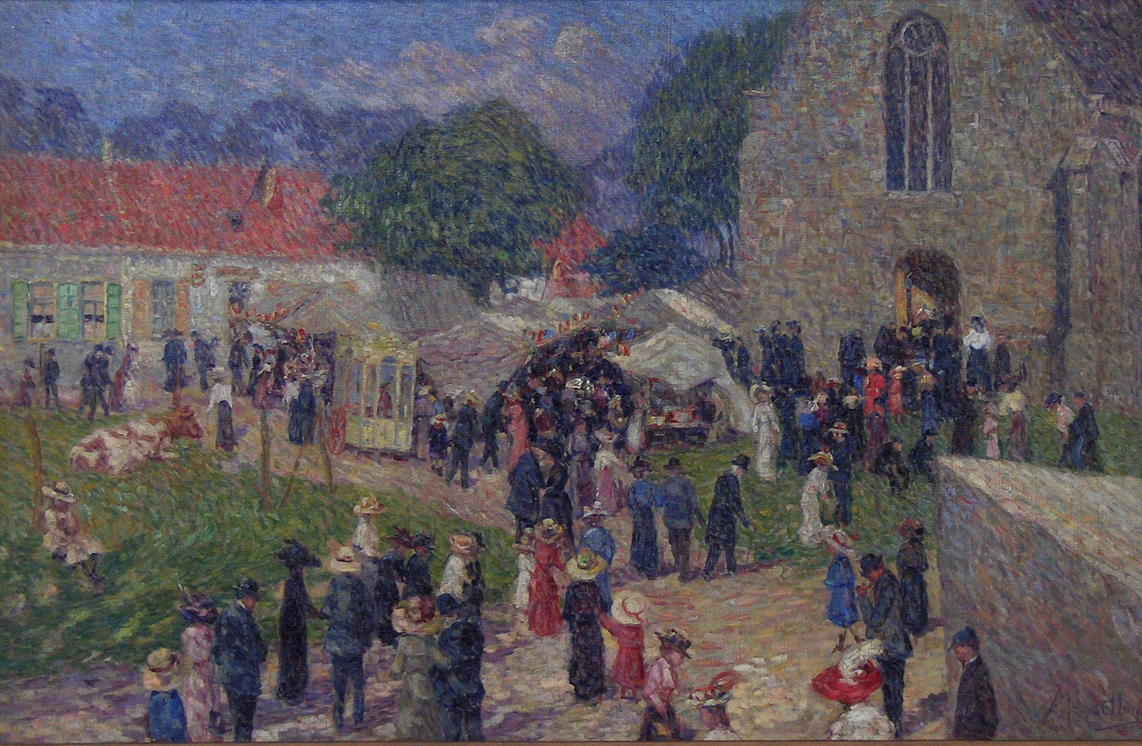 "Kermis te Kerselaere"; (ca. 1912) olieverf op doek door Modest Huys (1874-1932); 59 x 59 cm Museum van Deinze en de Leiestreek, België